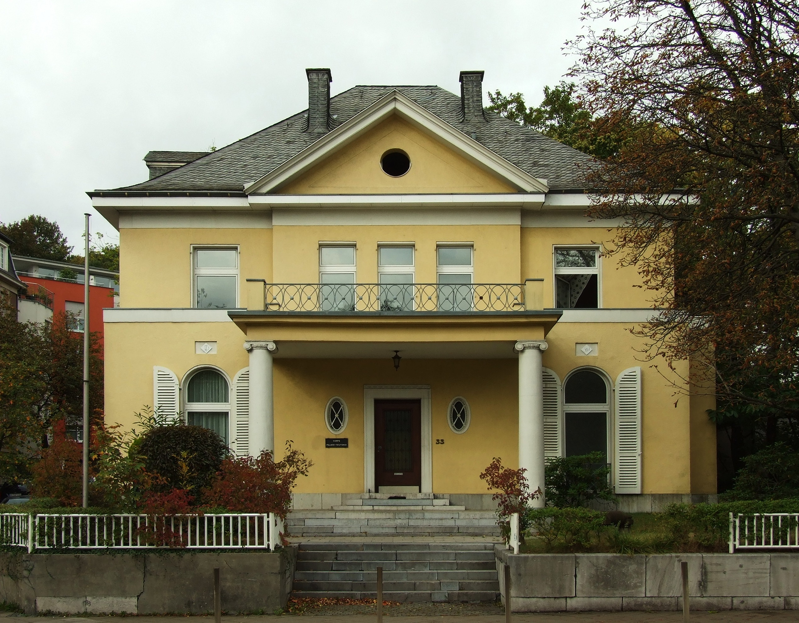 Haus der Corps Palaeo-Teutonia Aachen, 2009